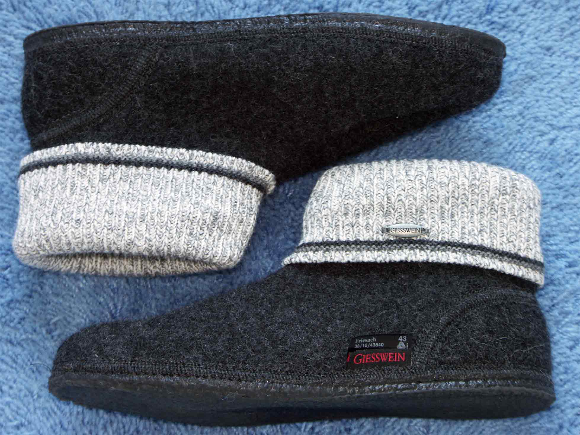 Paar Hüttenschuh, Filz aus reiner Schurwolle mit Strickrand und Latexsohle, vom österreichischen Traditionshersteller Giesswein, Made in Austria